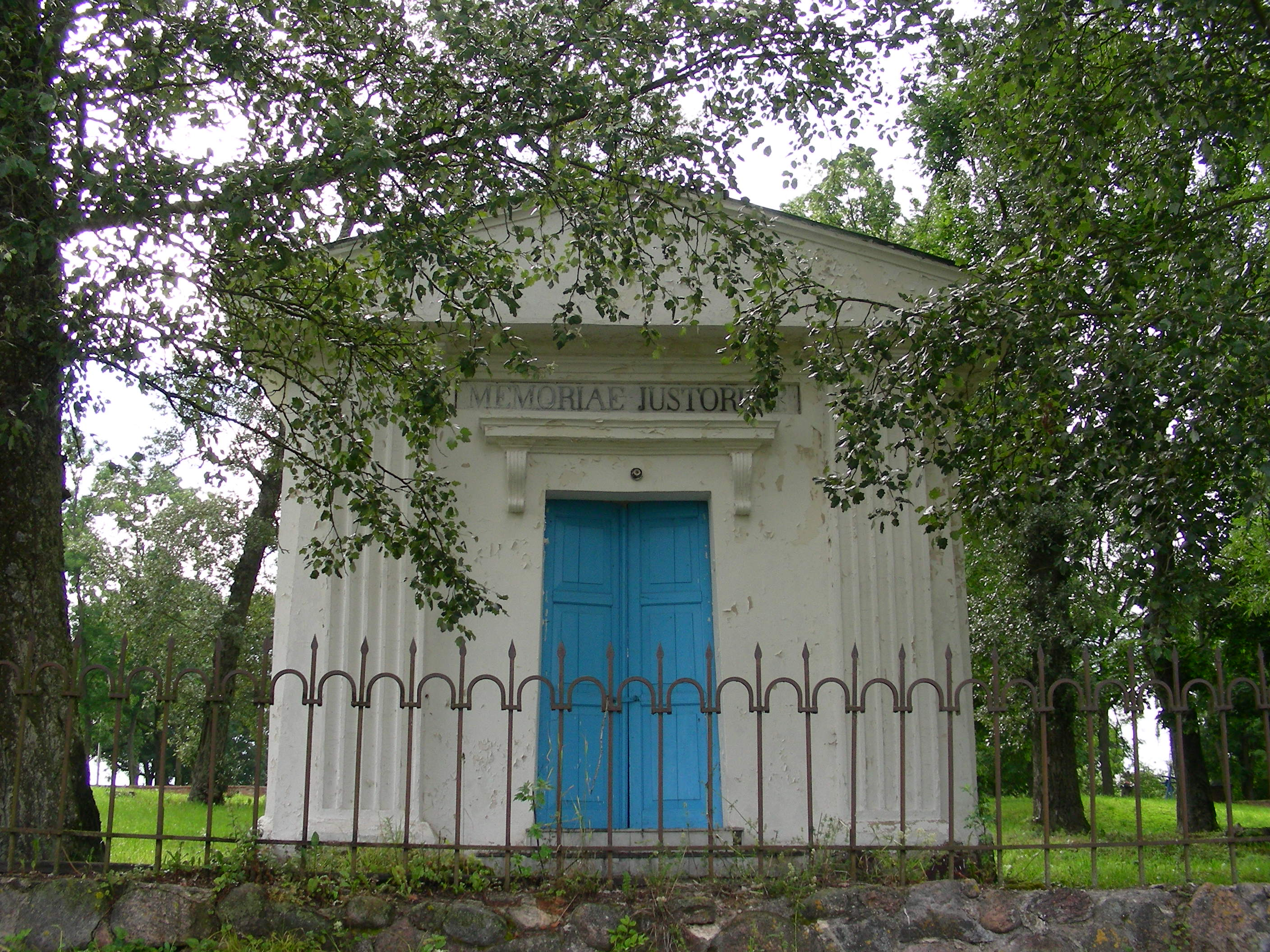 Беларуская (тарашкевіца): Сьвята-Пакроўская царква. в. Вялікая Ліпа This is a photo of Belarusian heritage monument. Reference number: 613Г000485 ( WLM)